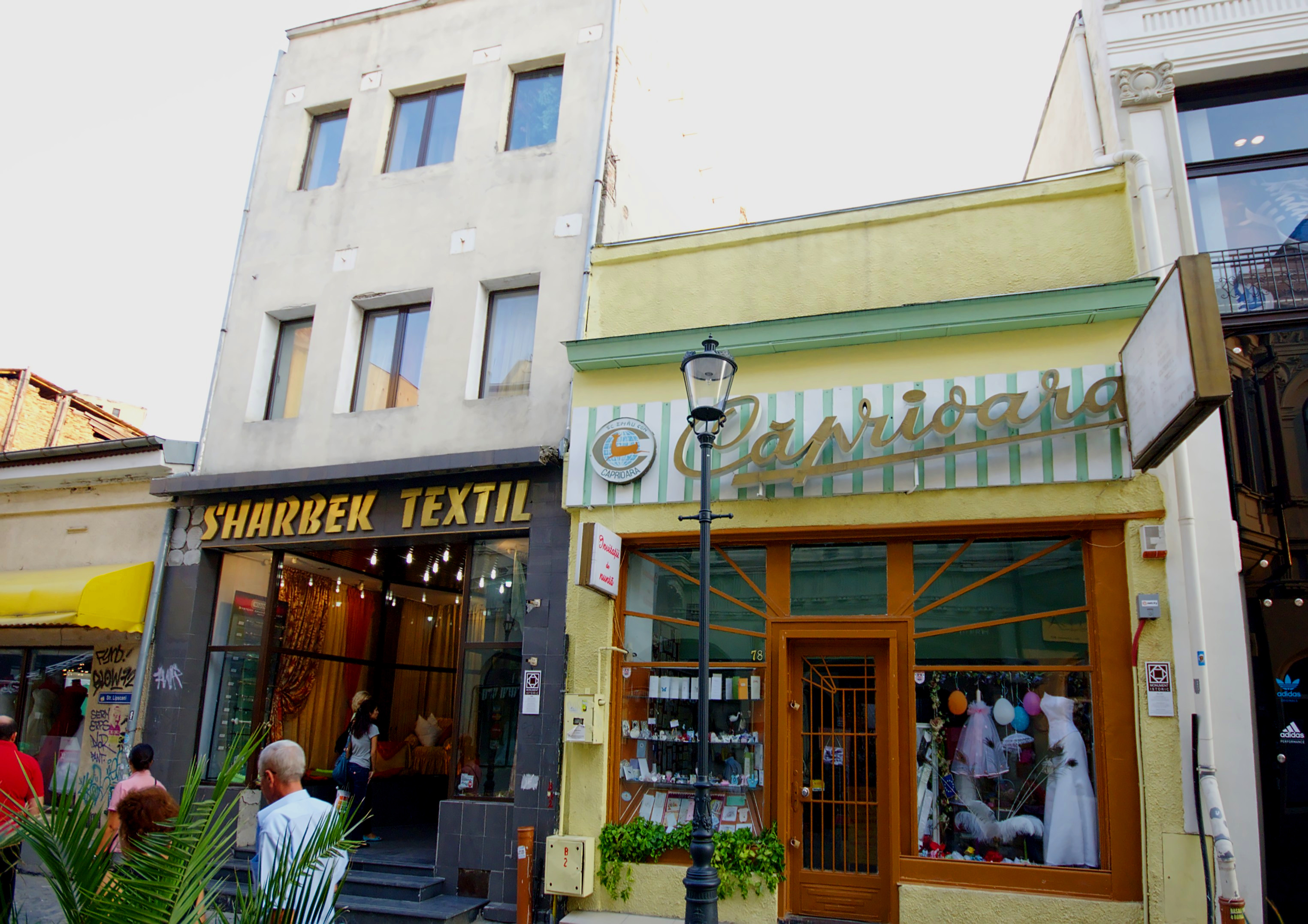 Casă cu prăvălie, Lipscani 78, 80